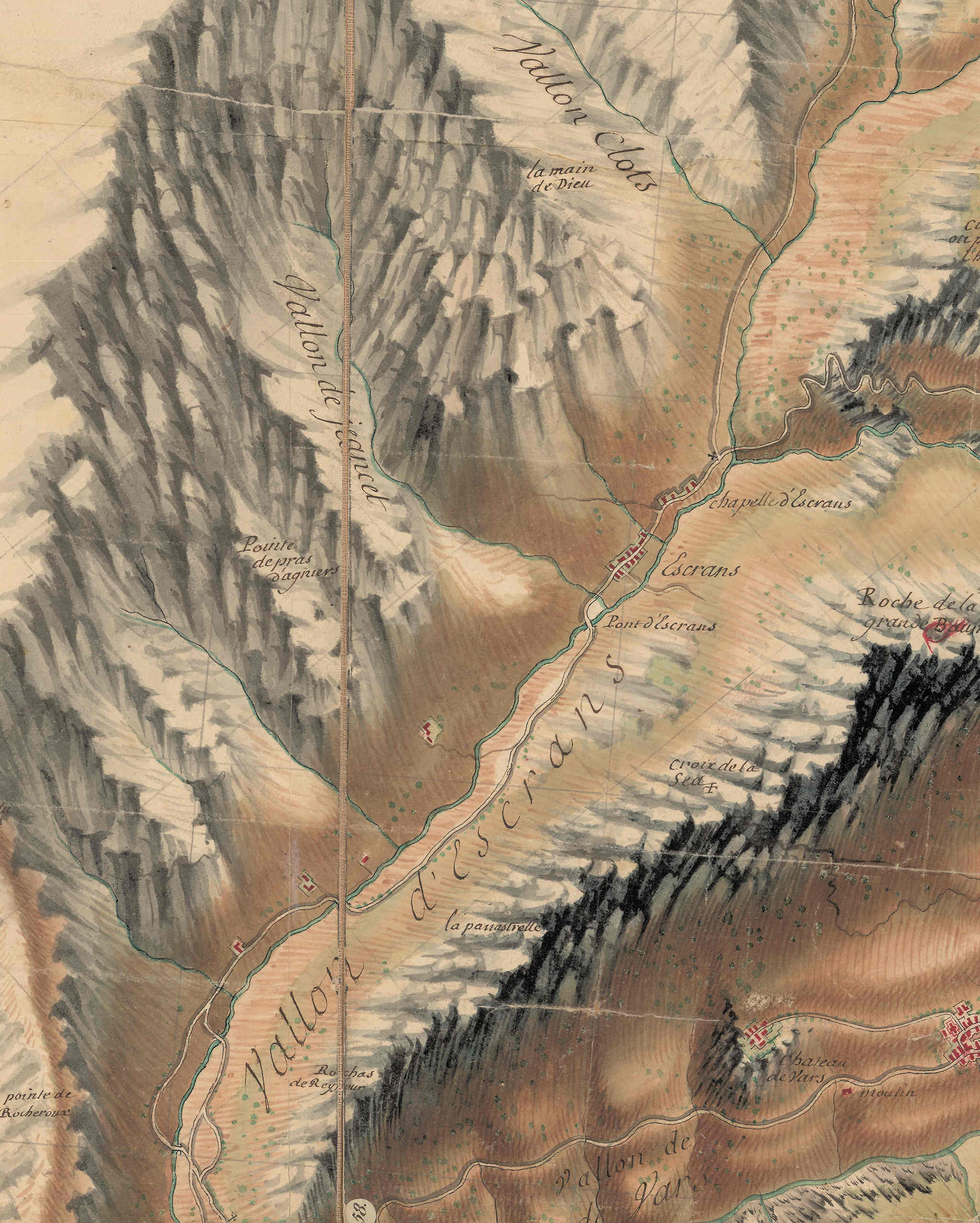 carte de Bourcet numérisé Paris, Nicolas-Alexandre et Olivier-Joseph, Extrait réduc JPG 30% Antoine-H